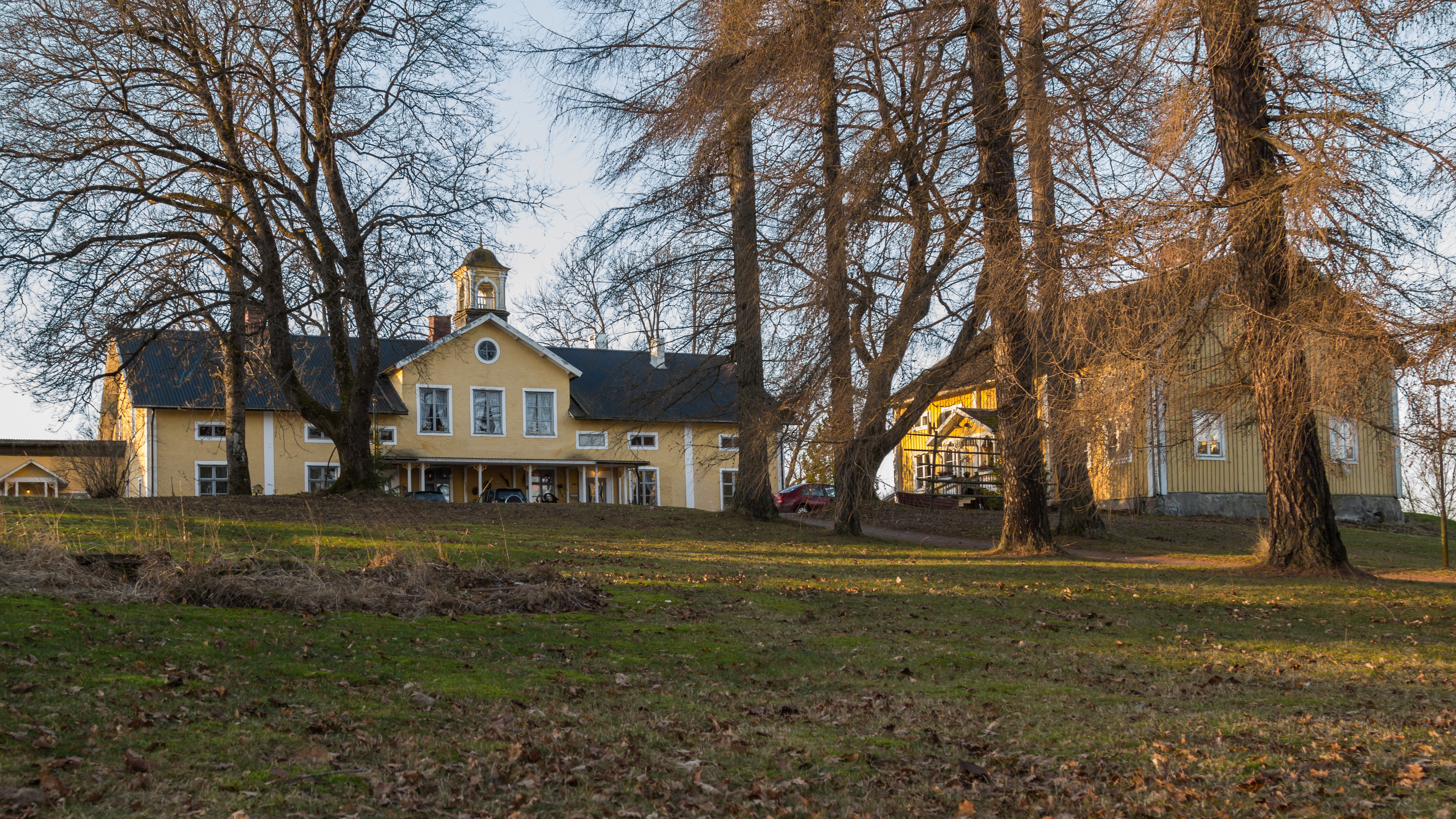 Herrgården i Prästhyttan, Hedemora kommun, Sverige.